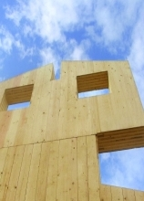 Massives wandelement